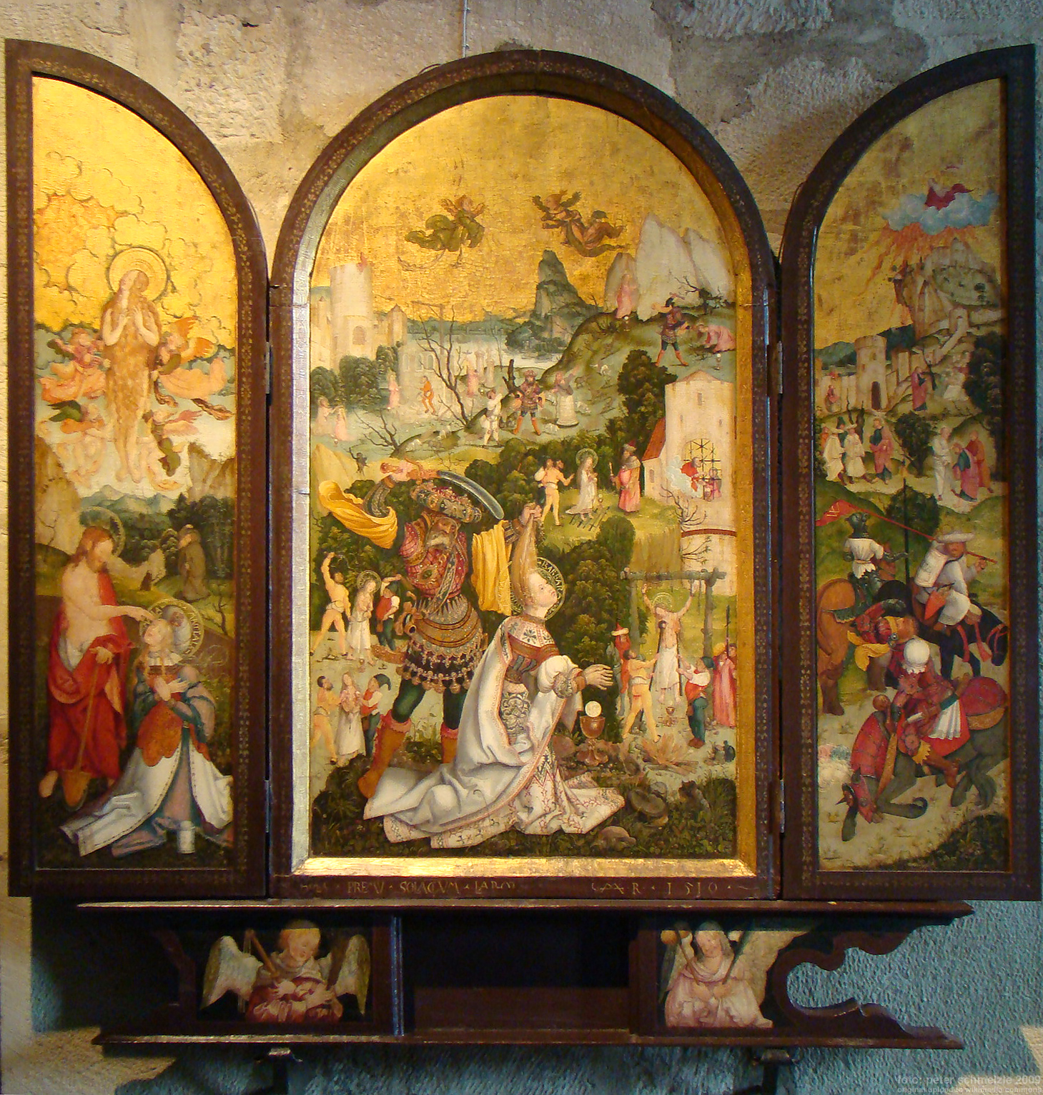 Barbara-Altar von Jerg Ratgeb in der Stadtkirche Schwaigern